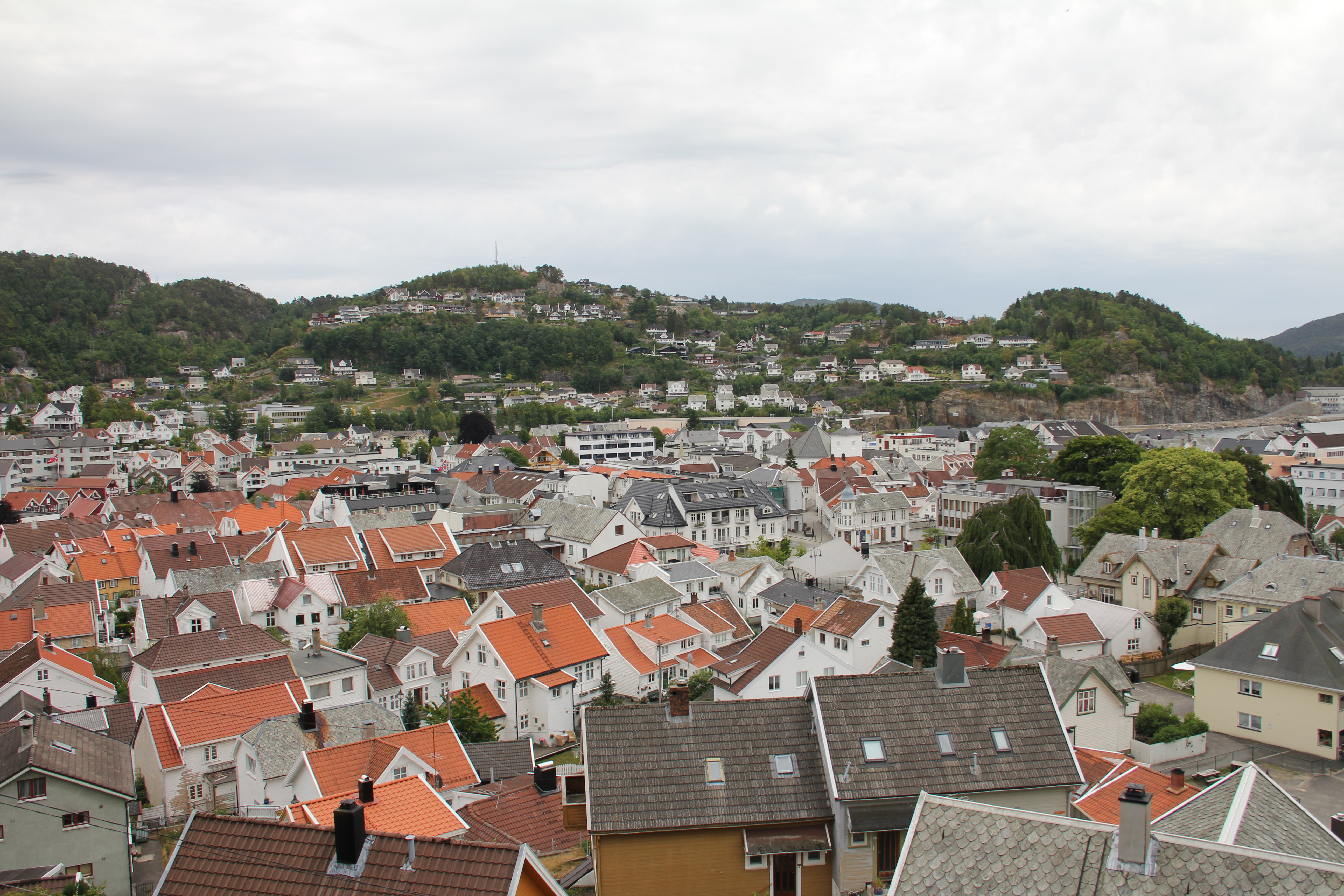 Flekkefjord, rooftops